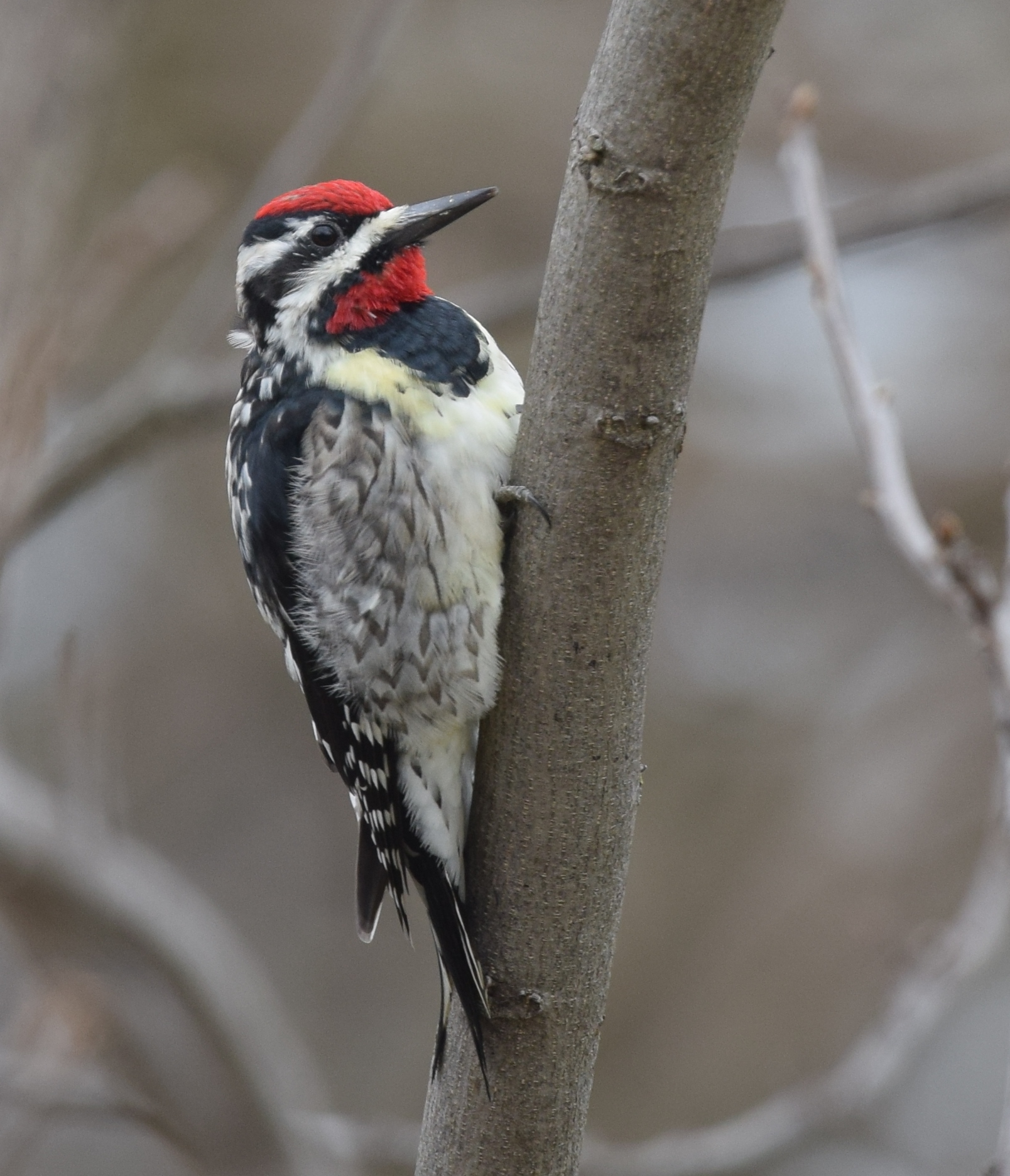 3/26/17 Carondelet Park